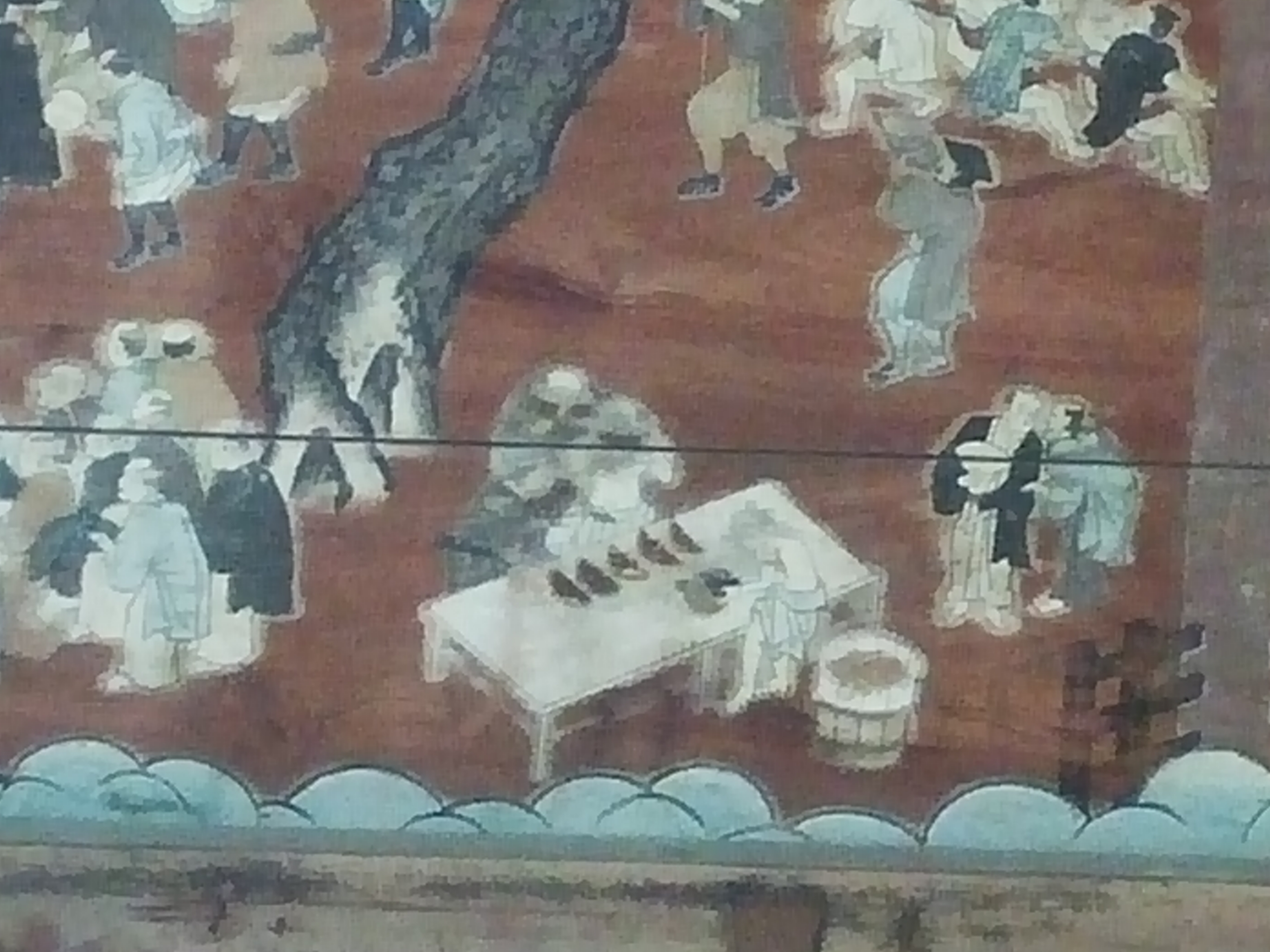 糸井神社「結崎の太鼓踊り絵馬」1842年（天保13年）に描かれた「西瓜を切売りする人」